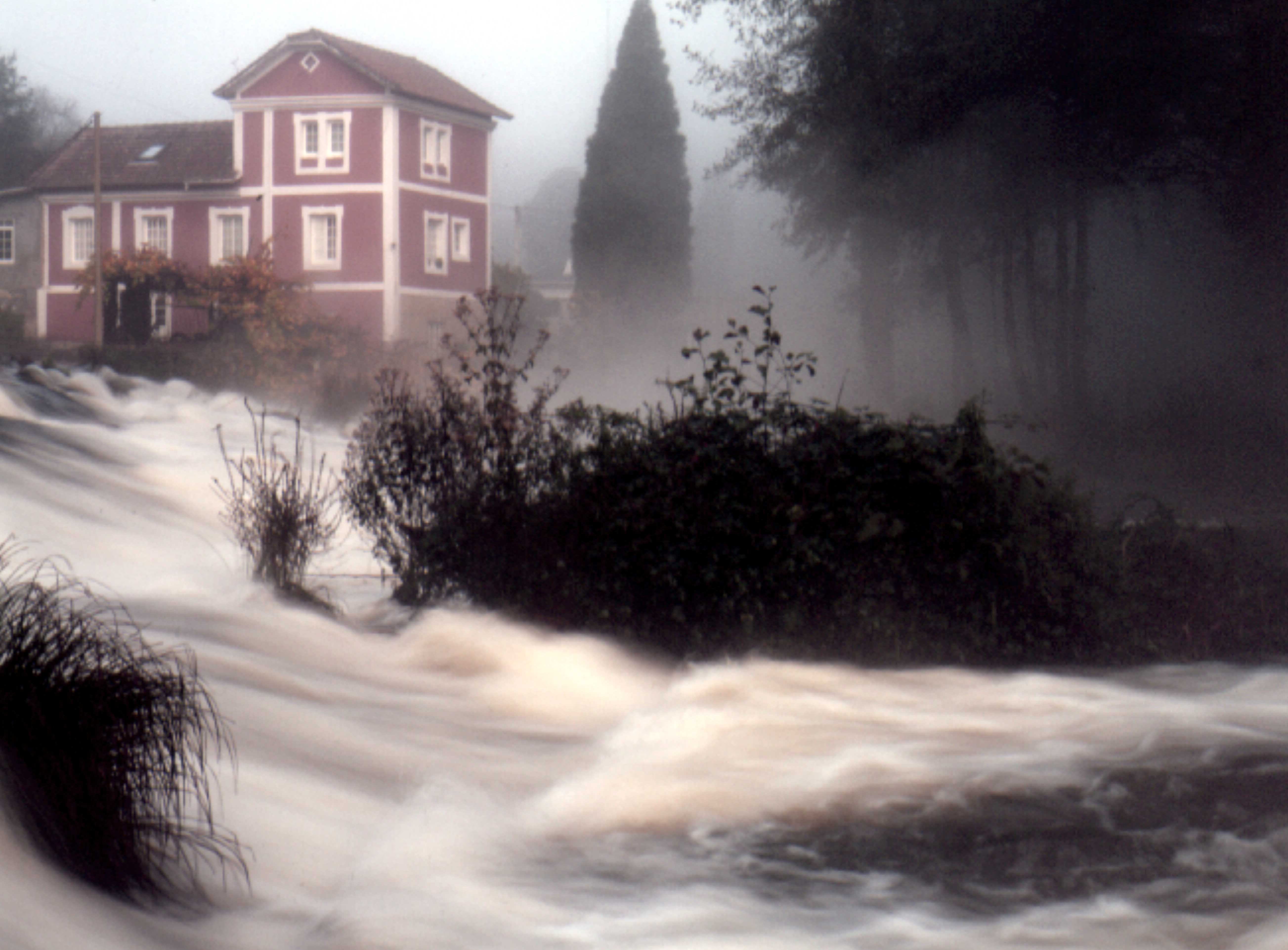 Bosque de Cecebre